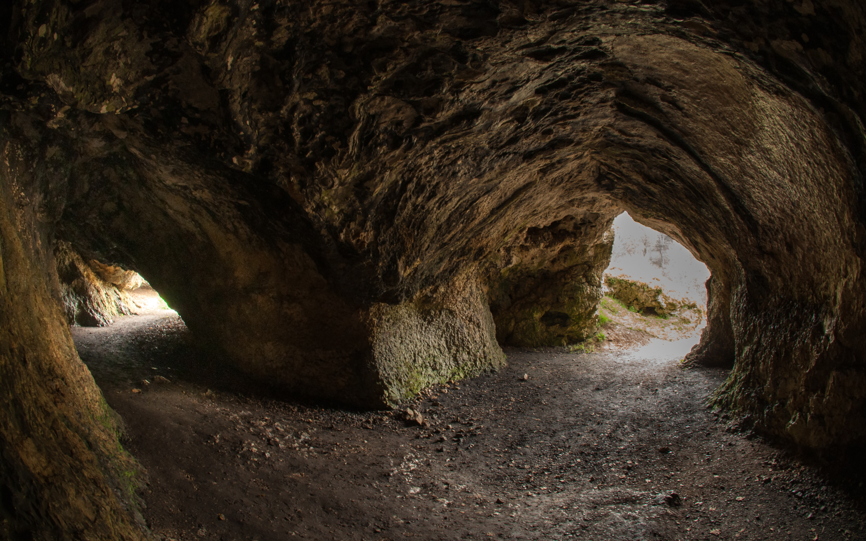 Innenansicht der Vogelherdhöhle im Lonetal bei Niederstotzingen.